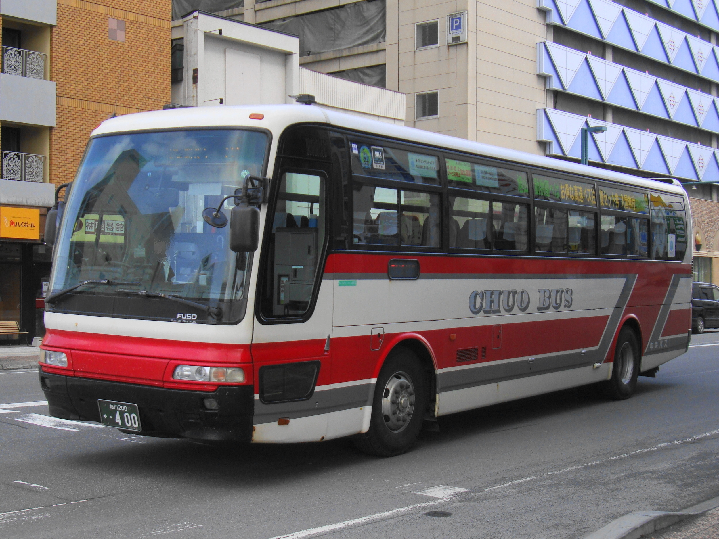 "Kōsoku Asahikawa gō" Sapporo to Asahikawa